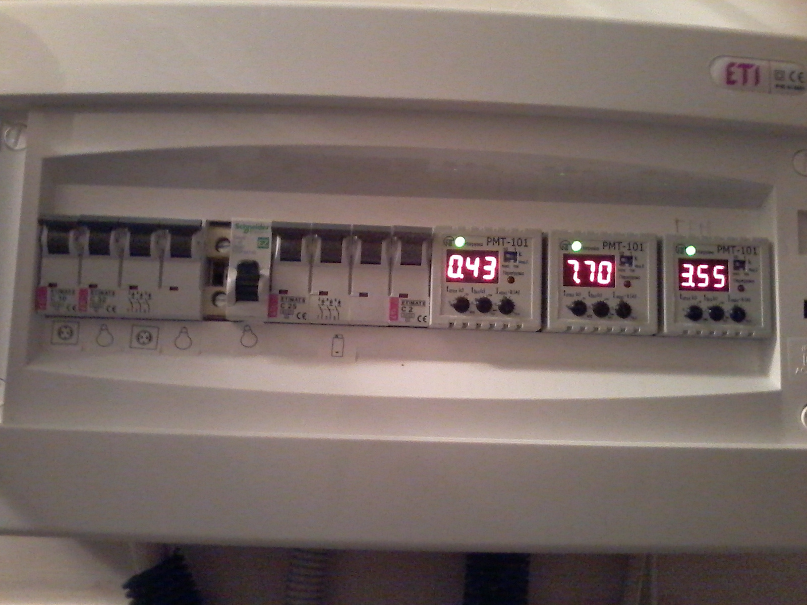 Автоматика розвантаження струму